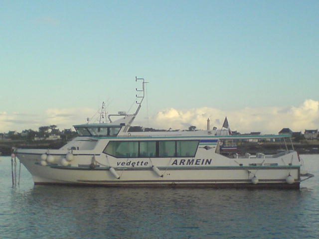 Vedette à passagers Adhara